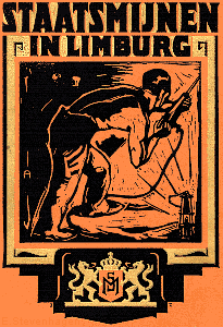 Publiek domein publ. 1928.Uit: Bijlage behorende bij het kerstnummer 1928 van "Het Drukkersweekblad" dd. 22 december 1928. Staatsmijnen in Limburg.Algemeene Landsdrukkerij MCMXXVIII.Aangeboden door "Het verkoopkantoor der Staatsmijnen in Limburg". Maker afbeelding JZ onbekend. Scan en nabewerking Ed Stevenhagen 2005.